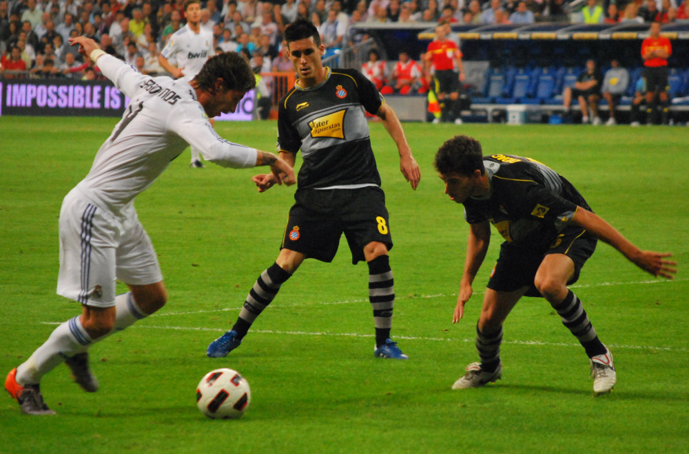 Sergio Ramos